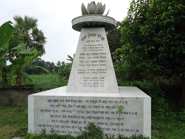 কাজলী মুক্তিযোদ্ধা স্মৃতি স্তম্ভ